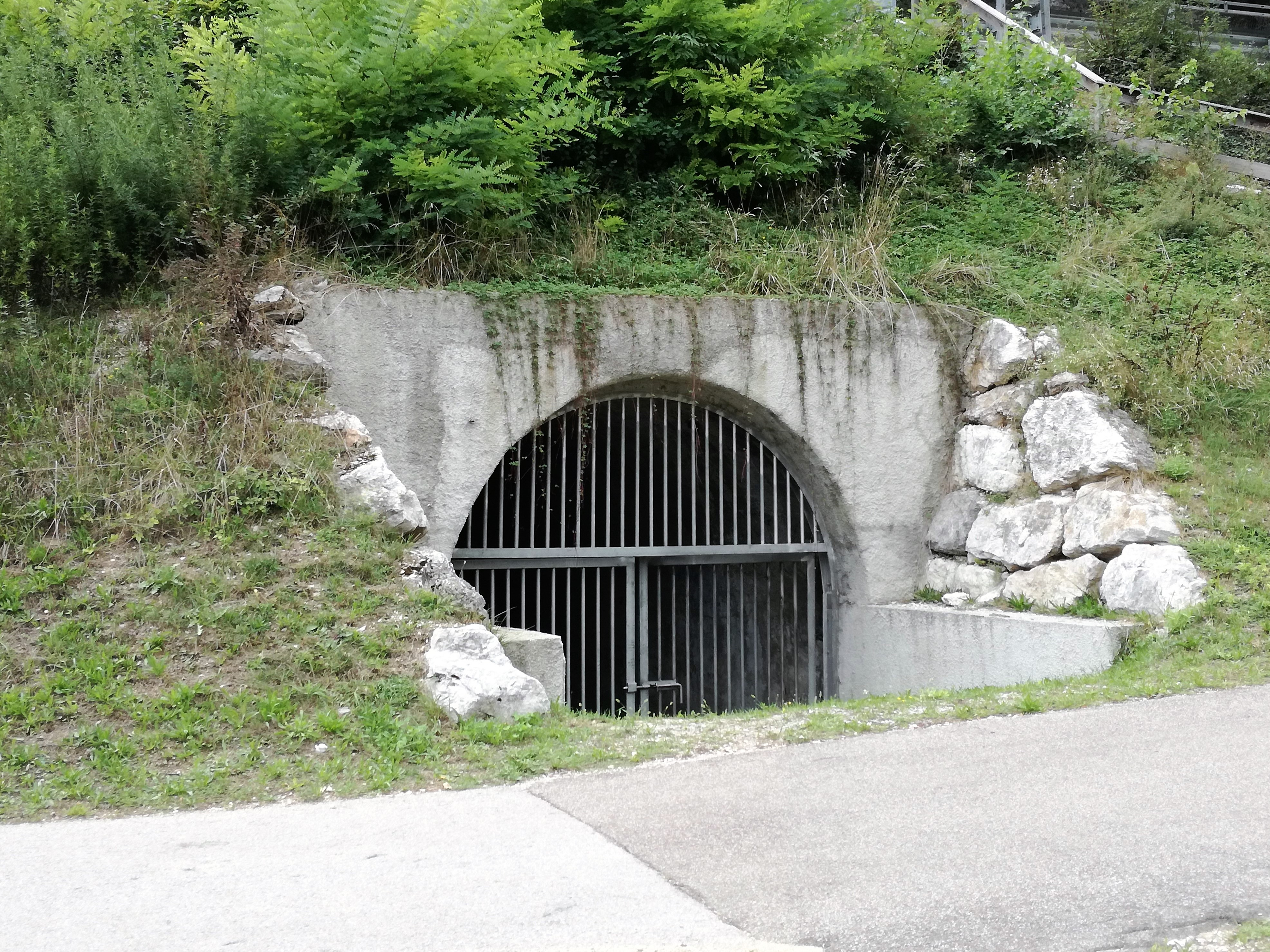 Eingang des Wartungs- und Belüftungstunnels des Hochwassertunnels Etsch-Gardasee auf Höhe Loppiosee